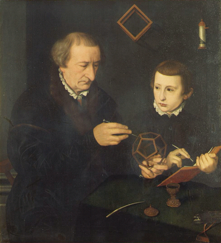 Bildnis des Nürnberger Schreibmeisters Johann Neudörffer und eines SchülersPortrait of Nuremberg Master Johann Neudörffer and a Studenttitle QS:P1476,de:"Bildnis des Nürnberger Schreibmeisters Johann Neudörffer und eines Schülers" label QS:Lde,"Bildnis des Nürnberger Schreibmeisters Johann Neudörffer und eines Schülers"